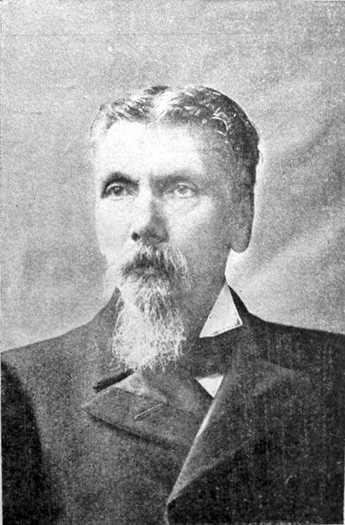 El presidente de la Argentina José Evaristo Uriburu en 1898.